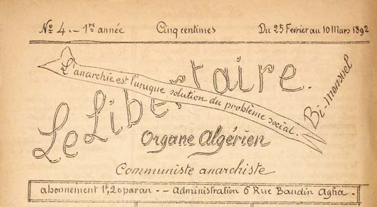 En 1892 à Alger, Jean Faure publie Le Libertaire6, « organe algérien communiste anarchiste ».